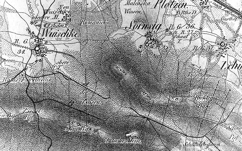 Original image description from the Deutsche Fotothek Hochkirch-Lehn. Oberreit, Sect. Stolpen, 1821/22